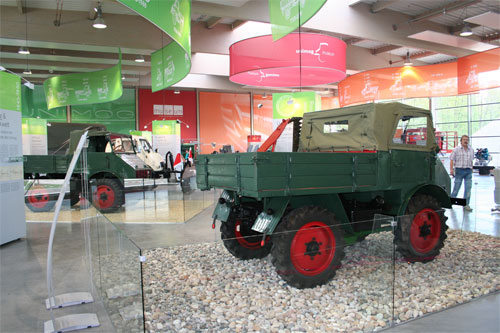 Bildbeschreibung: das neue Unimog-Museum von innen Quelle: Unimog-Museum Gaggenau, Fotograf/Zeichner: Unimog-Museum Gaggenau, Datum: 20. Mai 2006 Sonstiges: Pressefoto des Unimog-Museum